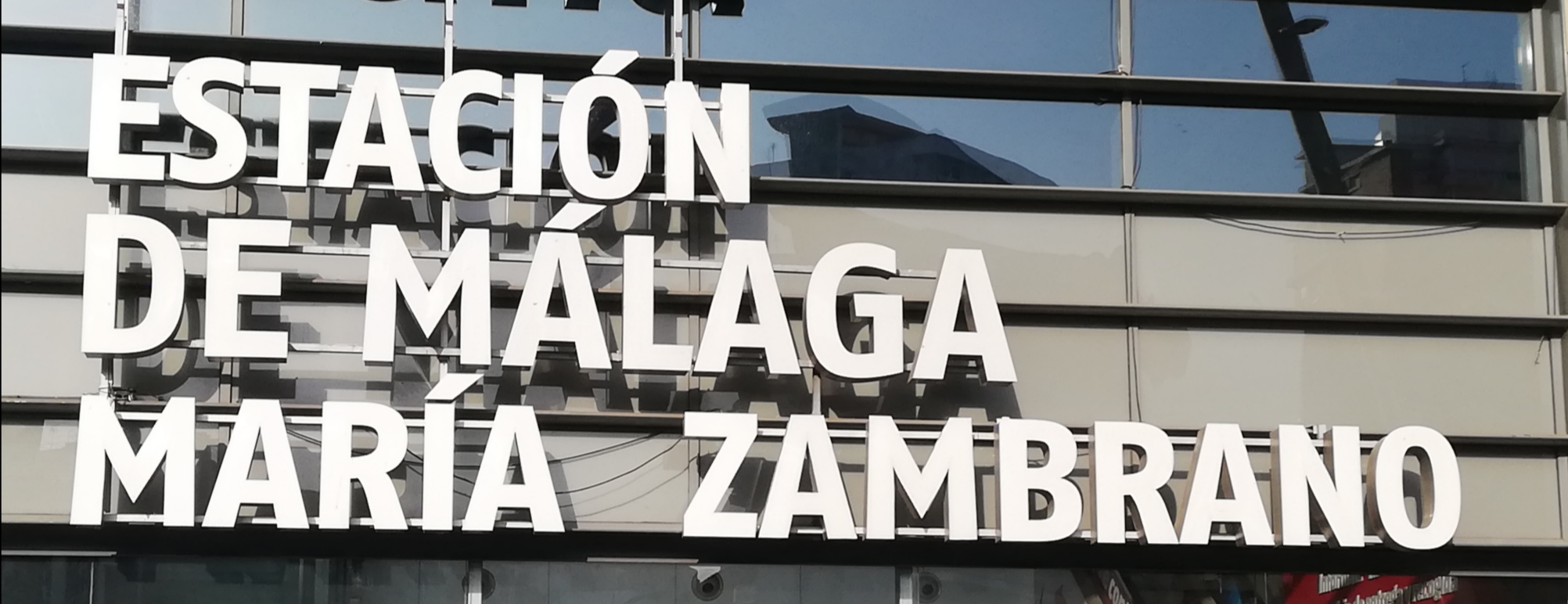 Malagako tren geltokia, Maria Zambrano izenarekin.